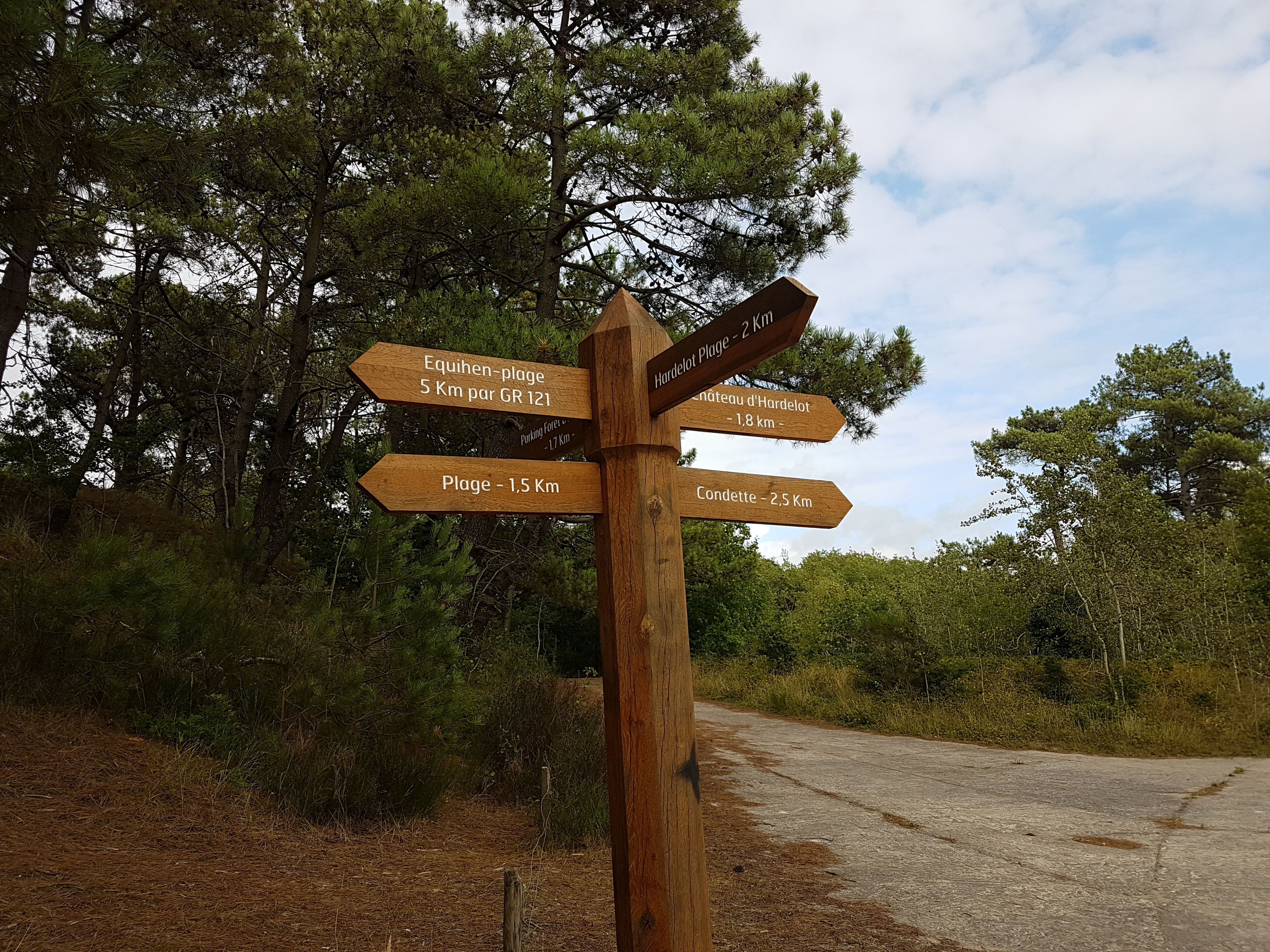 Panneau directionnel dans la forêt domaniale d'Écault (Pas-de-Calais, France)